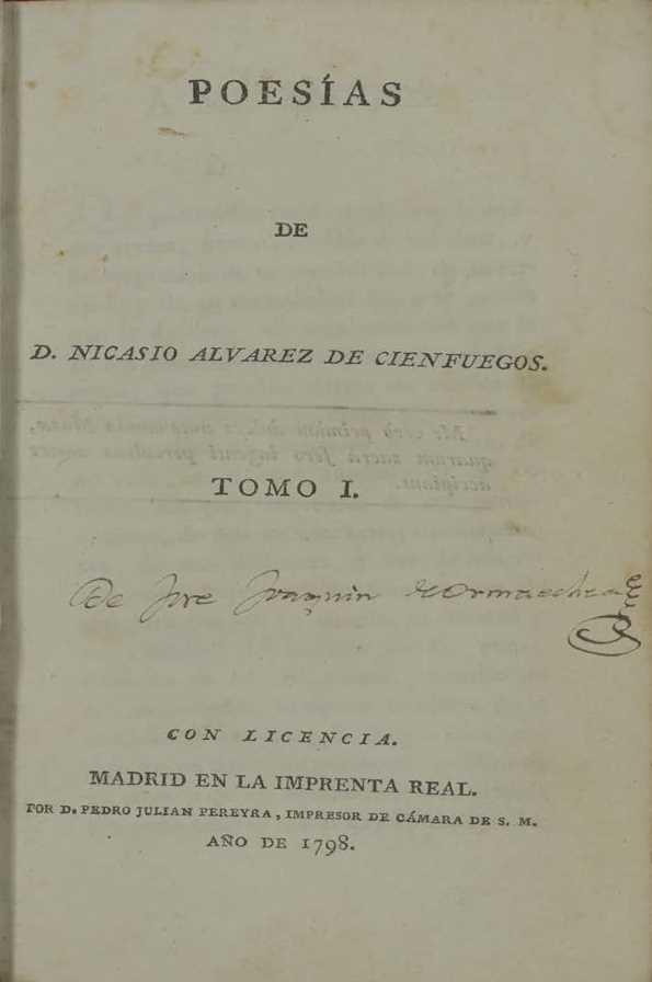 Titulní list vydání básní španělského básníka Nicasia Álvareze de Cienfuegos z roku 1798